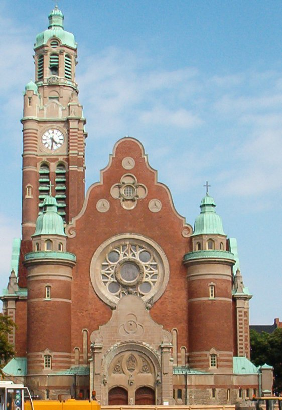 Sankt Johannes Church. Date: 30 July 2005. sv Höjden i kyrkan är 26 meter. Är en av Malmös största kyrkor.